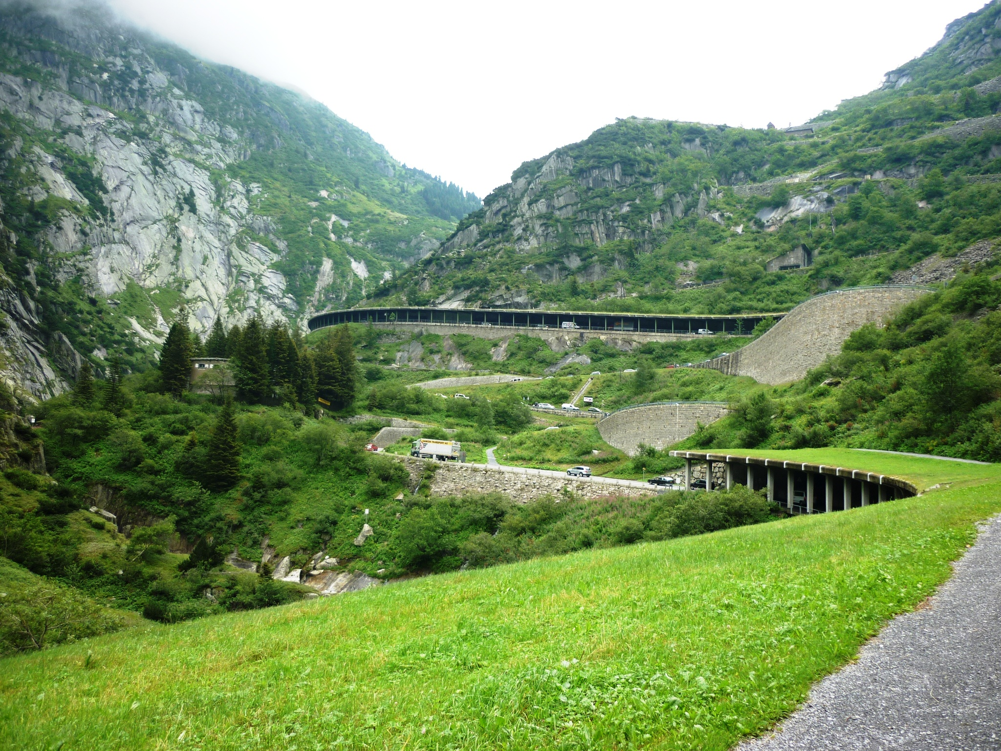 Fort Bäzberg, Andermatt UR, Schweiz